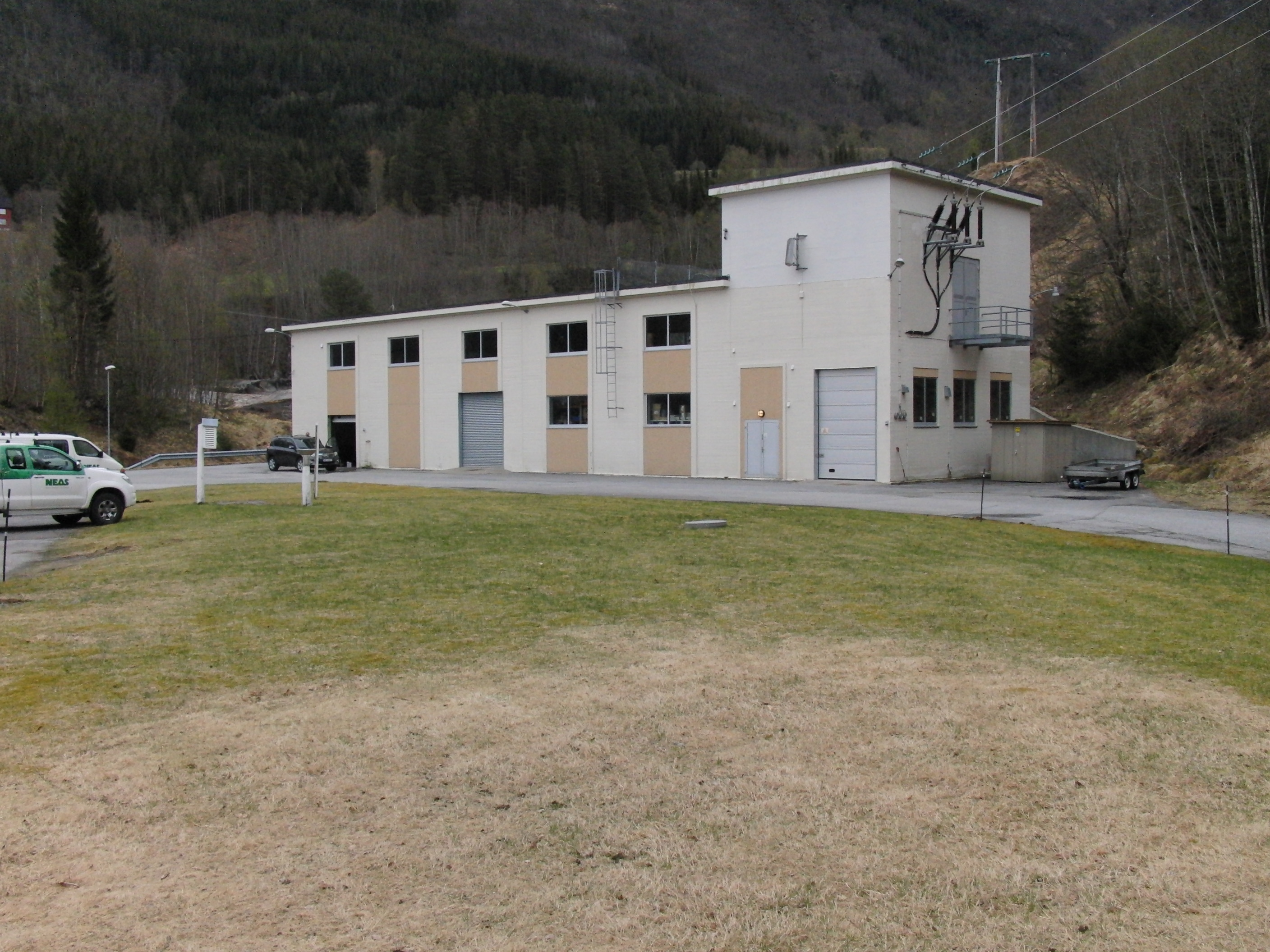 Gamle Ulvund kraftverk